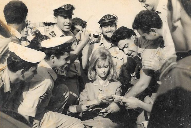 שחקית היווניה אליקי ויוקליקי מבקרת בטרפדות ומחלקת אוטוגרפים למעריצים